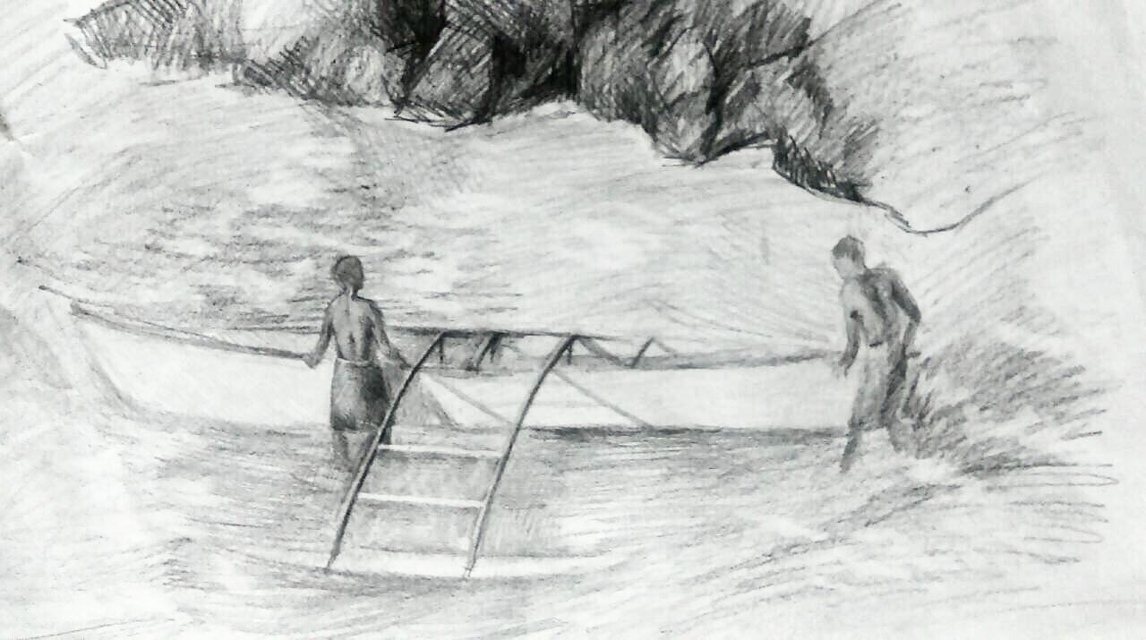 中文（台灣）: 吉爾伯特漁人與獨木舟 周律卉畫